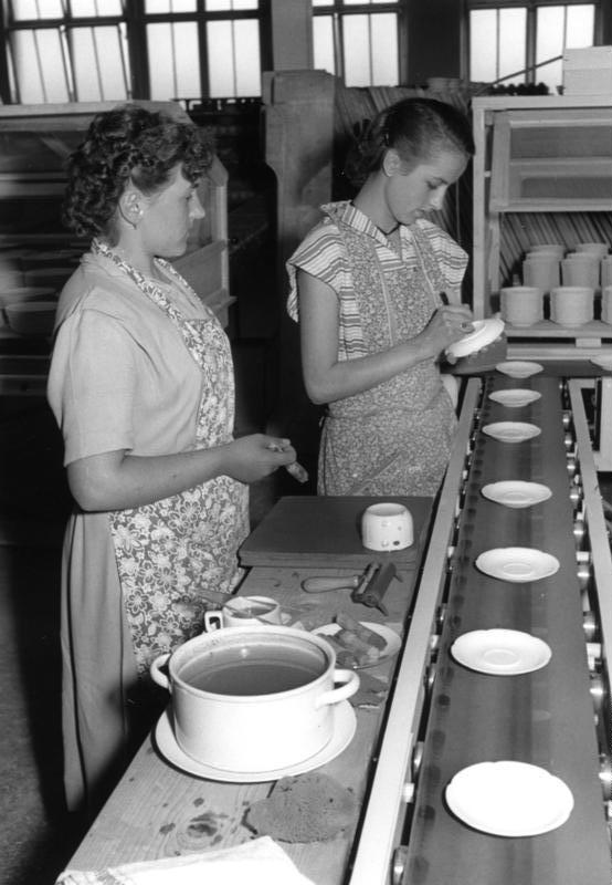 Mai 1954 Weiden/Oberpfalz Porzellanfabrik Seltmann Information added by Wikimedia users.